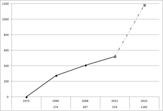 Магистрали в България (в км)